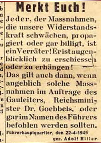 Zeitung für die Verteidiger Berlins mit Warnung vor der Schwächung der Widerstandskraft. Berlin, 23. April 1945